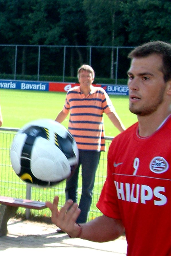 Danko Lazović, PSV Eindhoven. Op de Herdgang